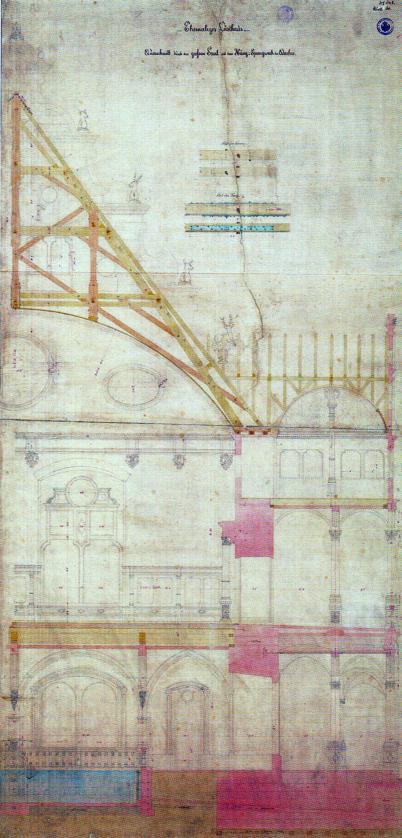 Querschnitt des Neuen Lusthauses mit Dachwerk (Bauaufnahme erstellt während des Abbruchs)